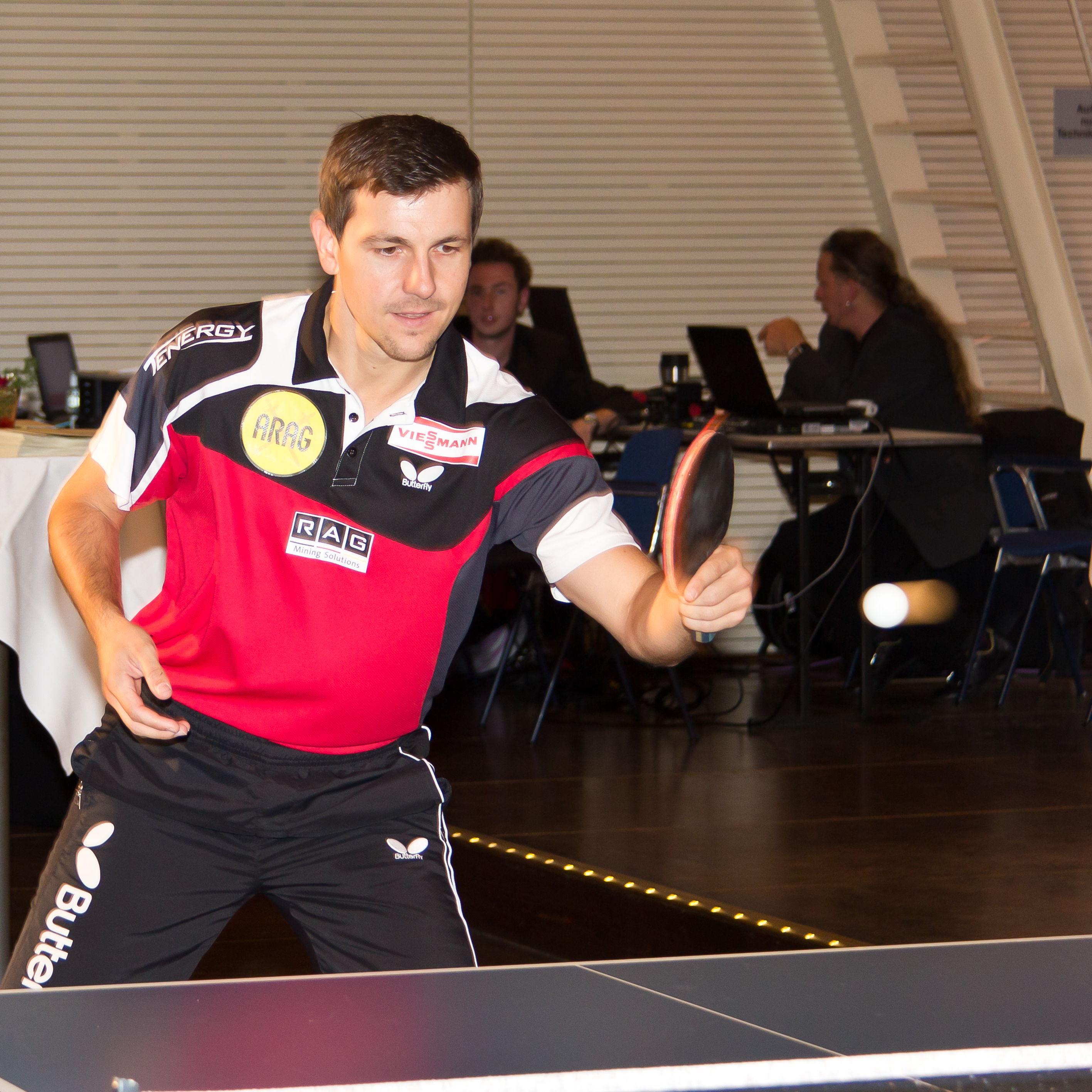 „Business and Investors Forum China 2012“ im Gürzenich, Köln Foto: Profi-Tischtennisspieler Timo Boll im Spiel mit Teilnehmern des Forums